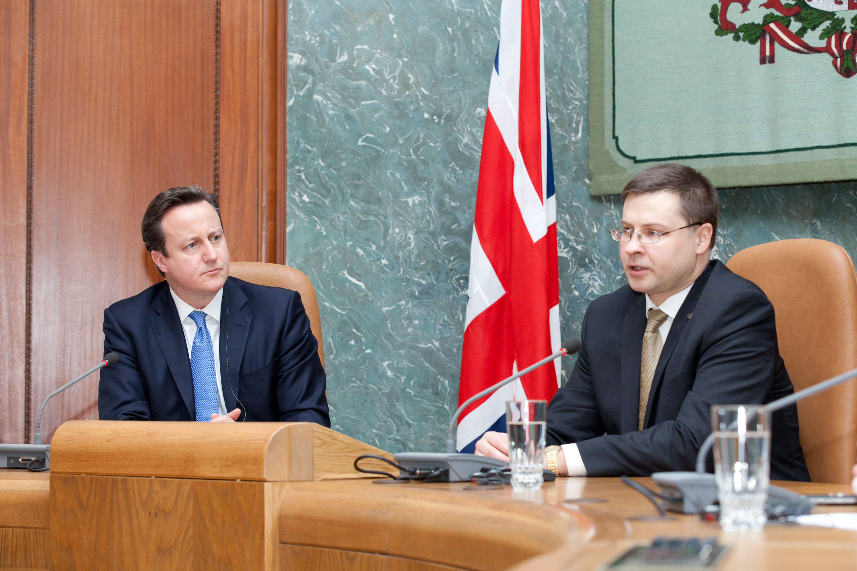 Foto: Toms Norde, Valsts kanceleja